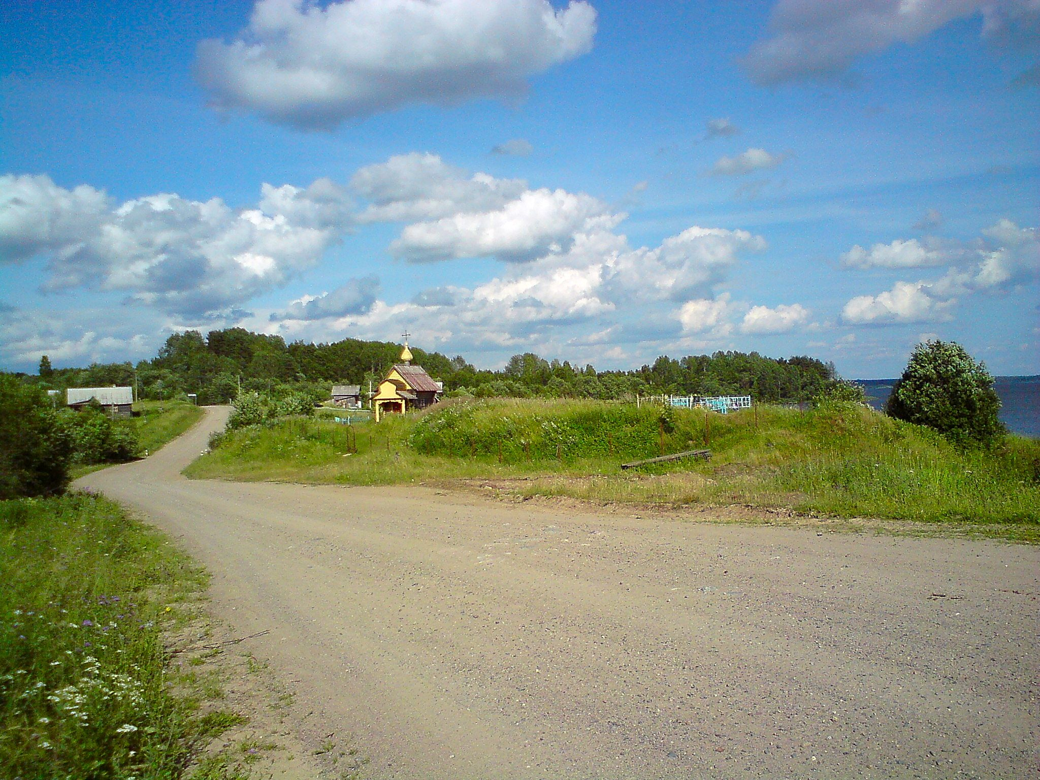 Часовня на берегу Пидьмозера в д.Волнаволок